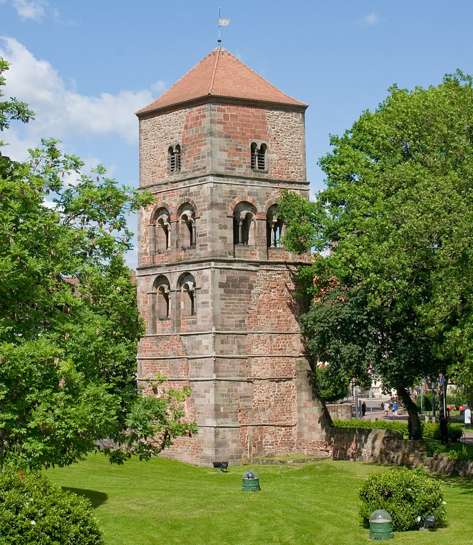 Katharinenturm des Klosters in Bad Hersfeld, an der Stiftsruine, Deutschland Die Stiftsruine in Bad Hersfeld ist die Ruine der Stiftskirche der ehemaligen Abtei Hersfeld in Bad Hersfeld. Sie gilt als die größte romanische Basilika nördlich der Alpen und ist heute die größte romanische Kirchenruine der Welt.